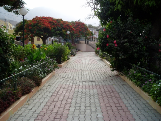 Praça da Vila da Ribeira Brava em São Nicolau, Cabo Verde